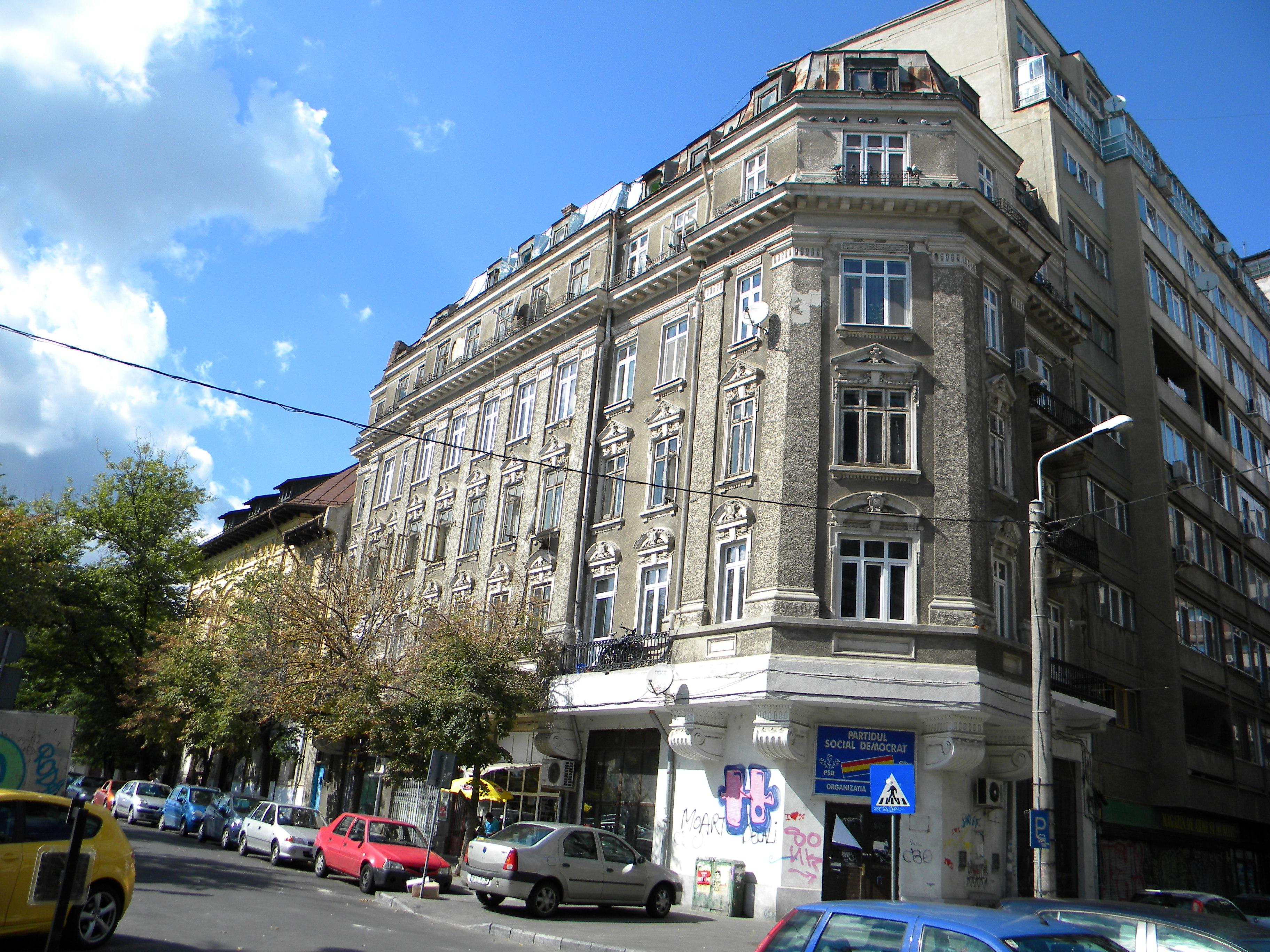 Casa pe Strada Ion Brezoianu nr. 1, Bucuresti sect 1